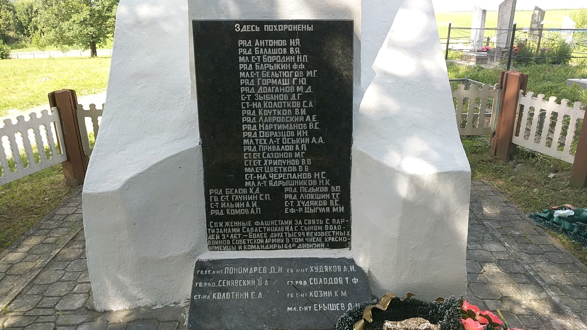 Военное захоронение в д. Рогово